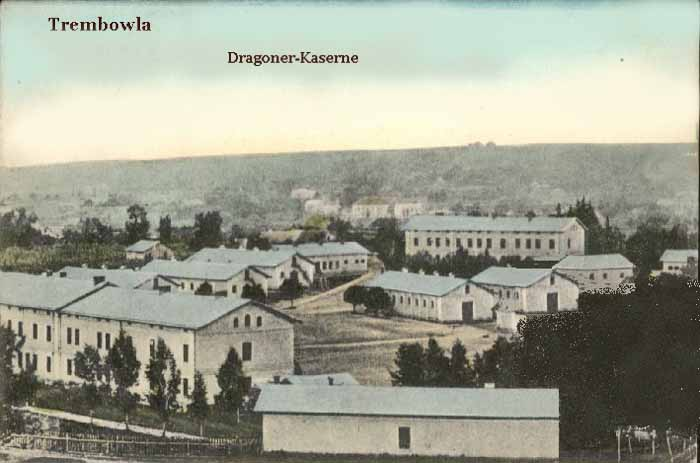 k.u.k. Dragonerkaserne in Trembowla